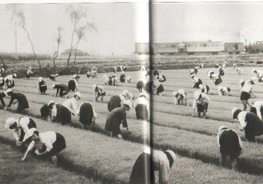 台灣糖業鐵路新港線客運火車